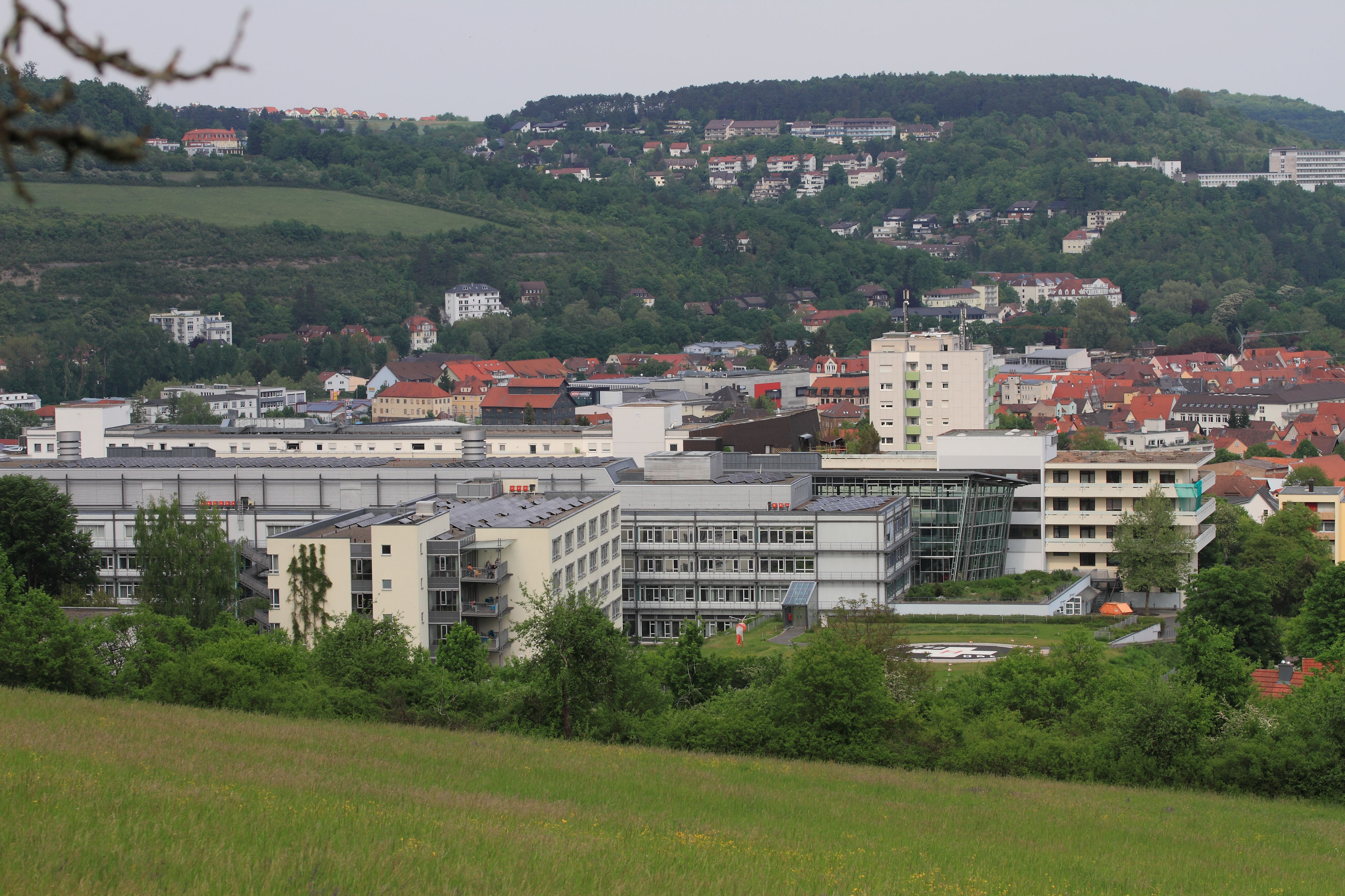 Das Caritas-Krankenhaus in Bad Mergentheim, Blick vom Trillberg.